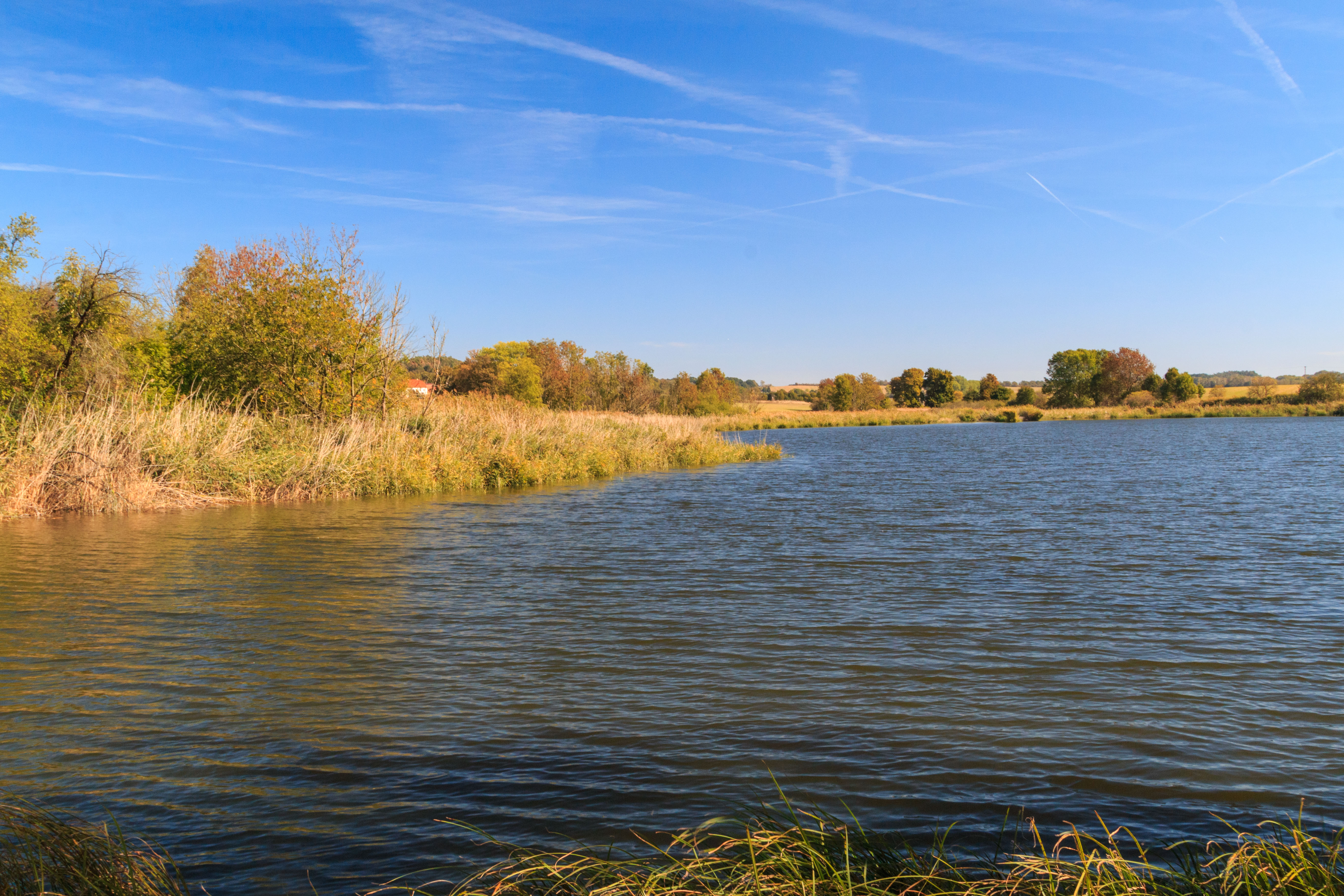 Rybník Brodek u Kněžmostu Project: Vodstvo.